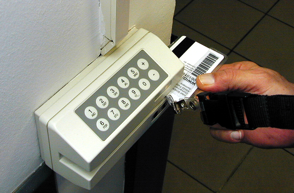 Zugangskontrolle